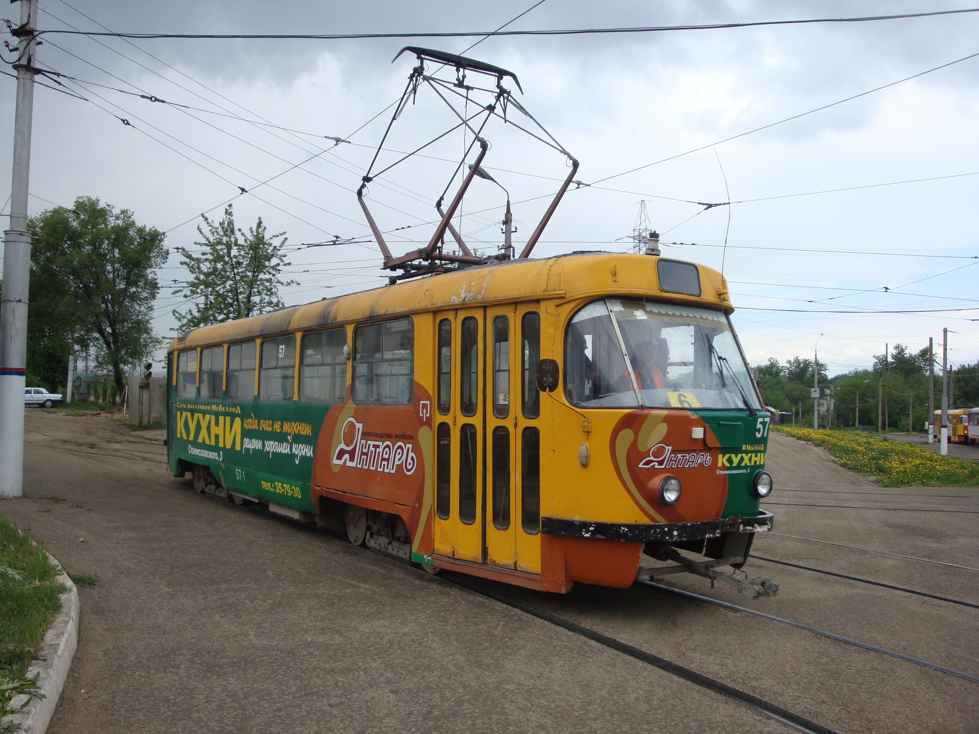 Tatra T3 двухдверная